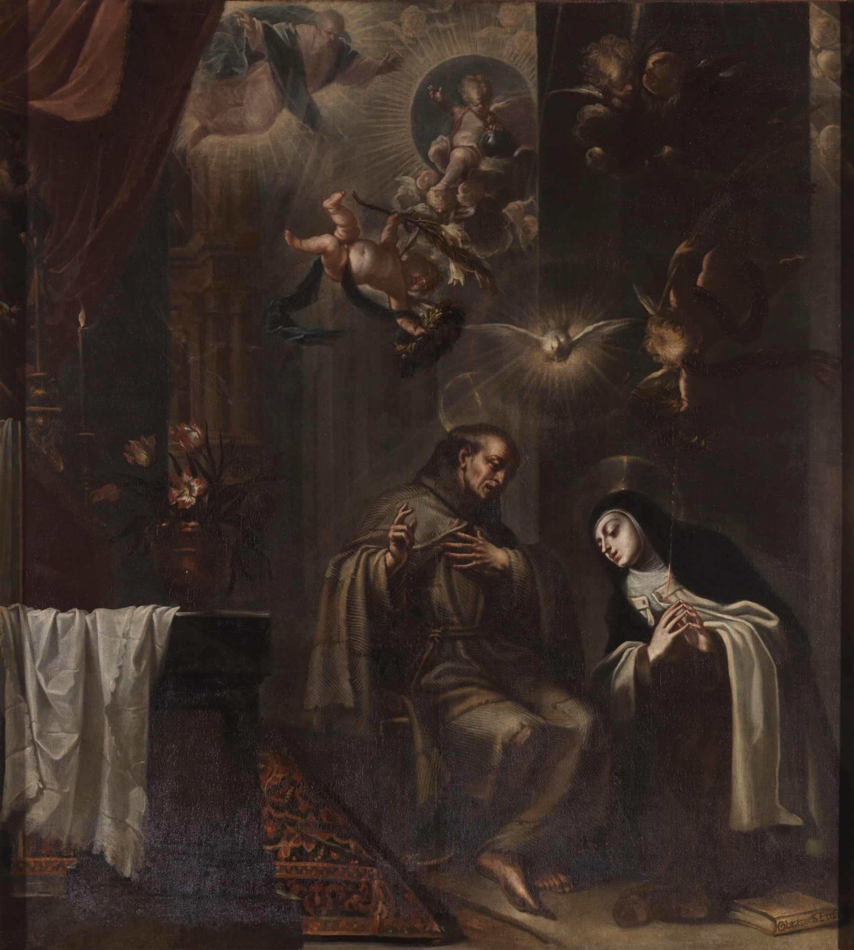 La obra representa al religioso franciscano San Pedro de Alcántara confesando a la mística carmelita Santa Teresa de Jesús.